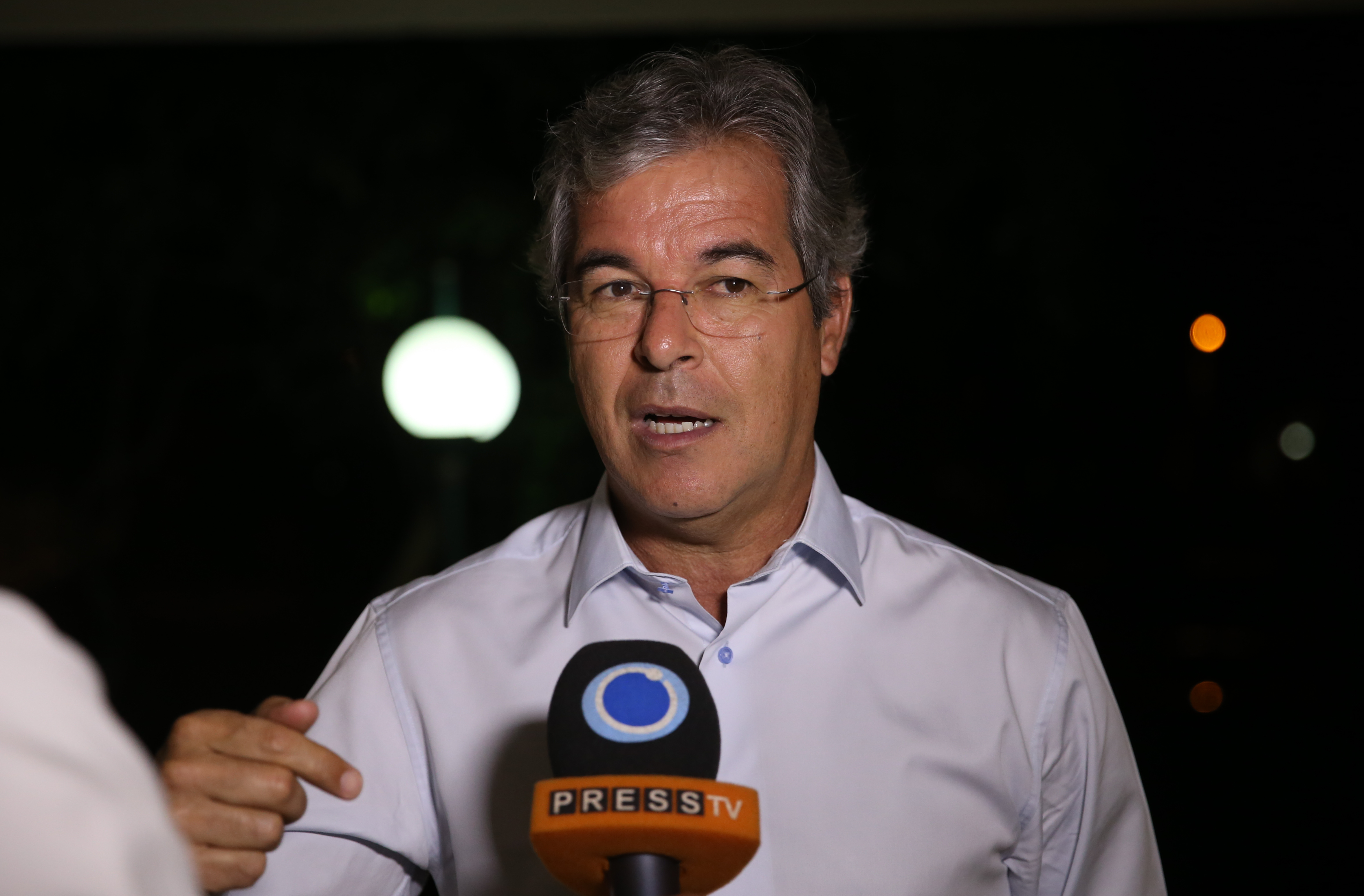 Brasília - O senador Jorge Viana fala à imprensa ao chegar para reunião no apartamento da senadora Lídice da Mata, sobre os detalhes da sessão do depoimento de Dilma Roussef, amanhã, no Senado Federal (José Cruz/Agência Brasil)